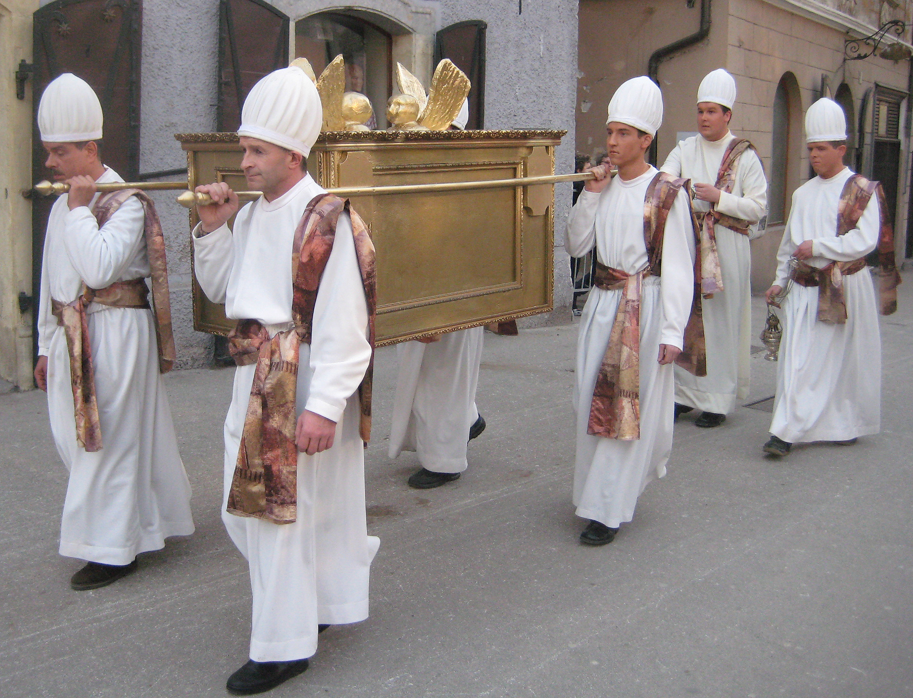 Škofjeloški pasijon (Processio Locopolitana), izvedba 2009 v Škofji Loki